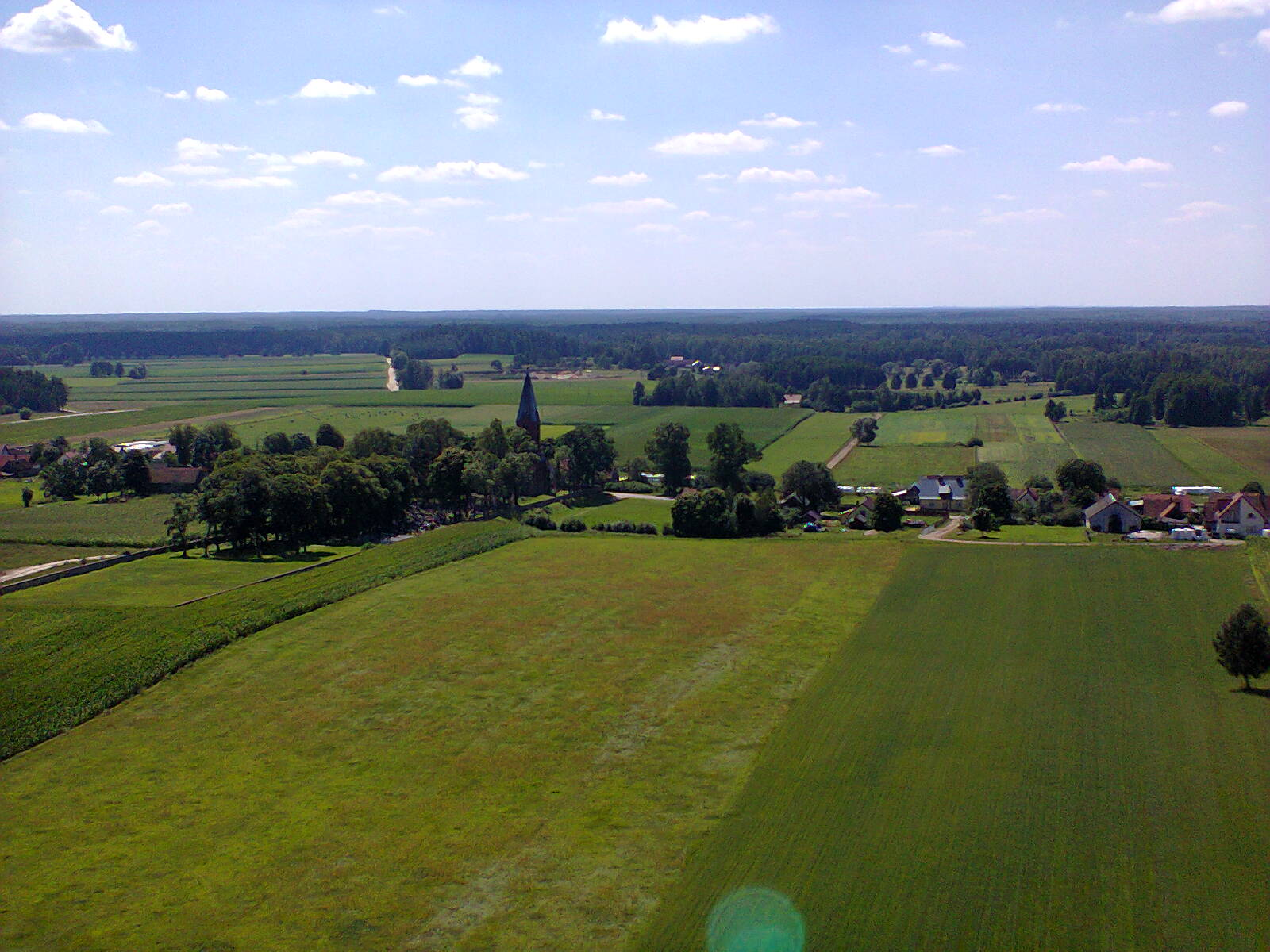 Widok z wieży przeciwpożarowej w Klonie (powiat szczycieński)